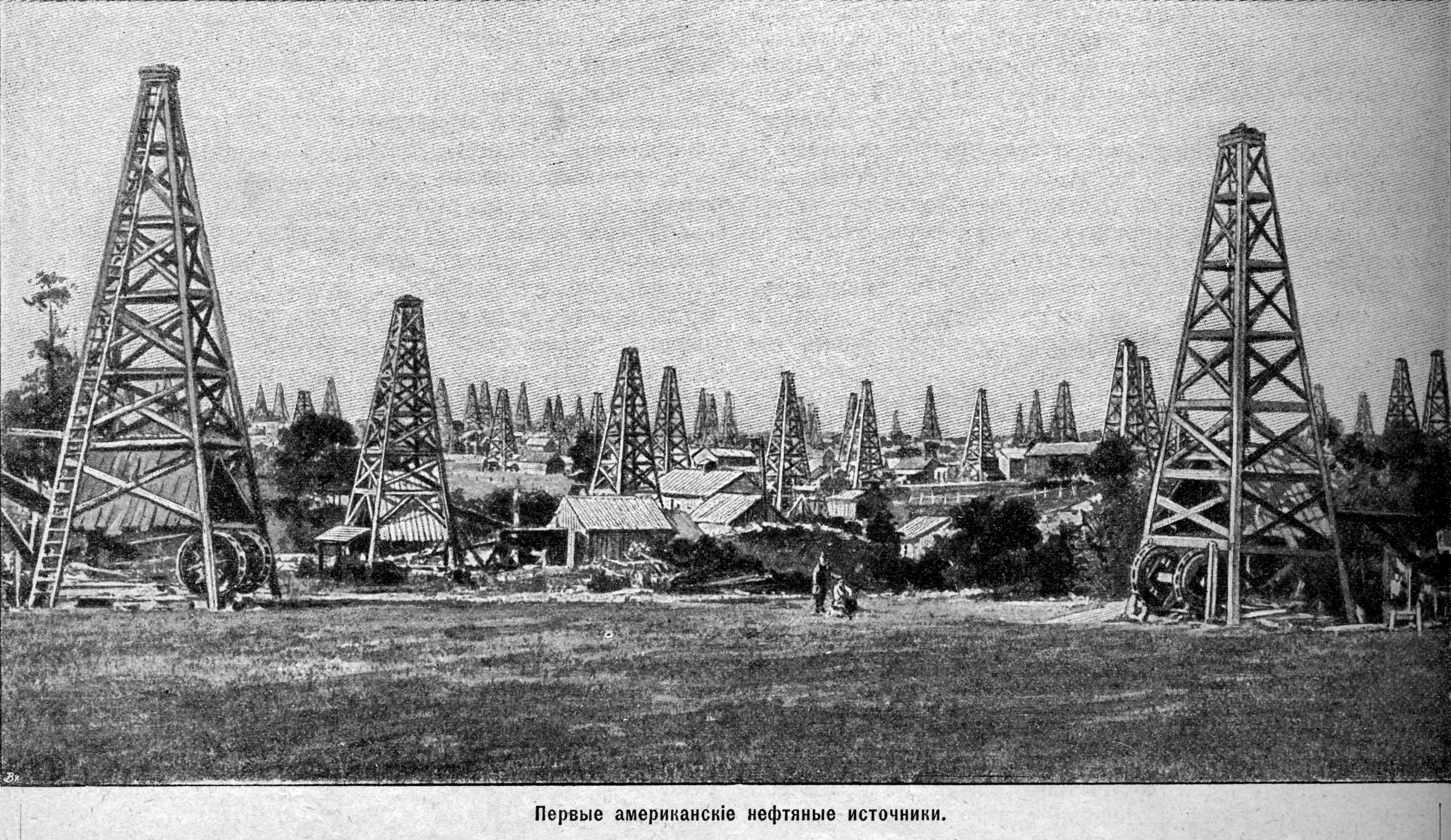 Первые американские нефтяные источники.